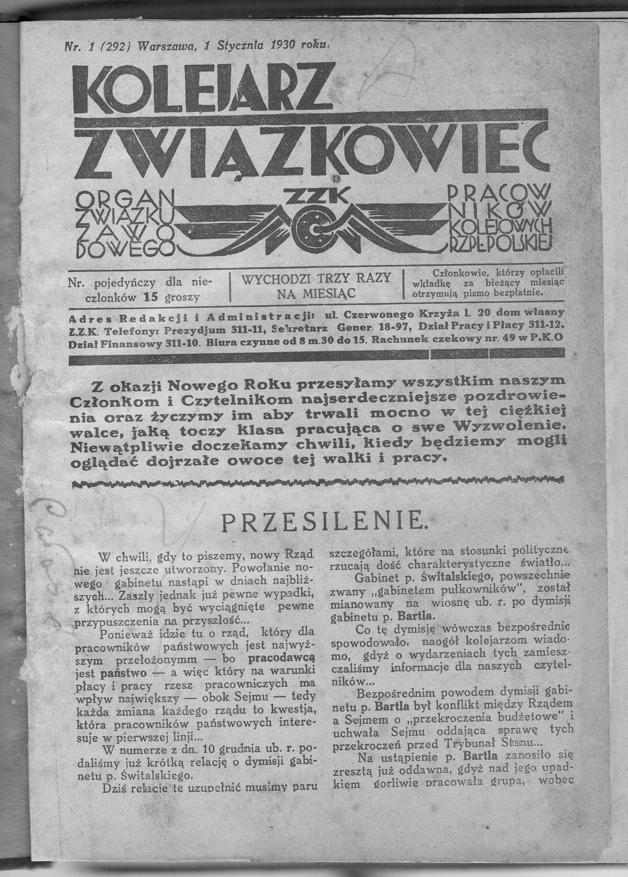 Skan strony tytułowej "Kolejarza Związkowca", nr 1 z rocznika 1930.